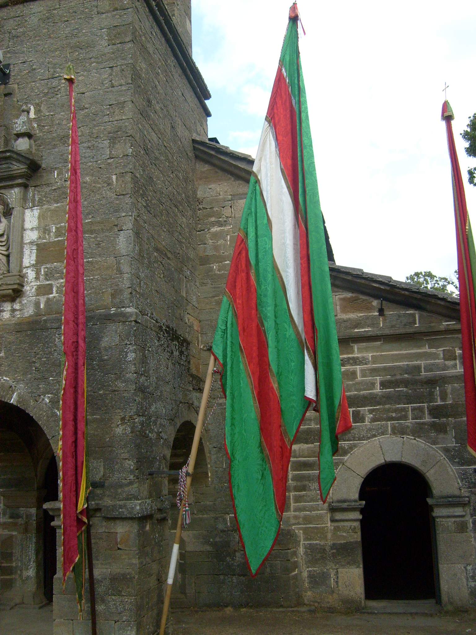 Pendón de San Justo en la ermita de la Alcobilla